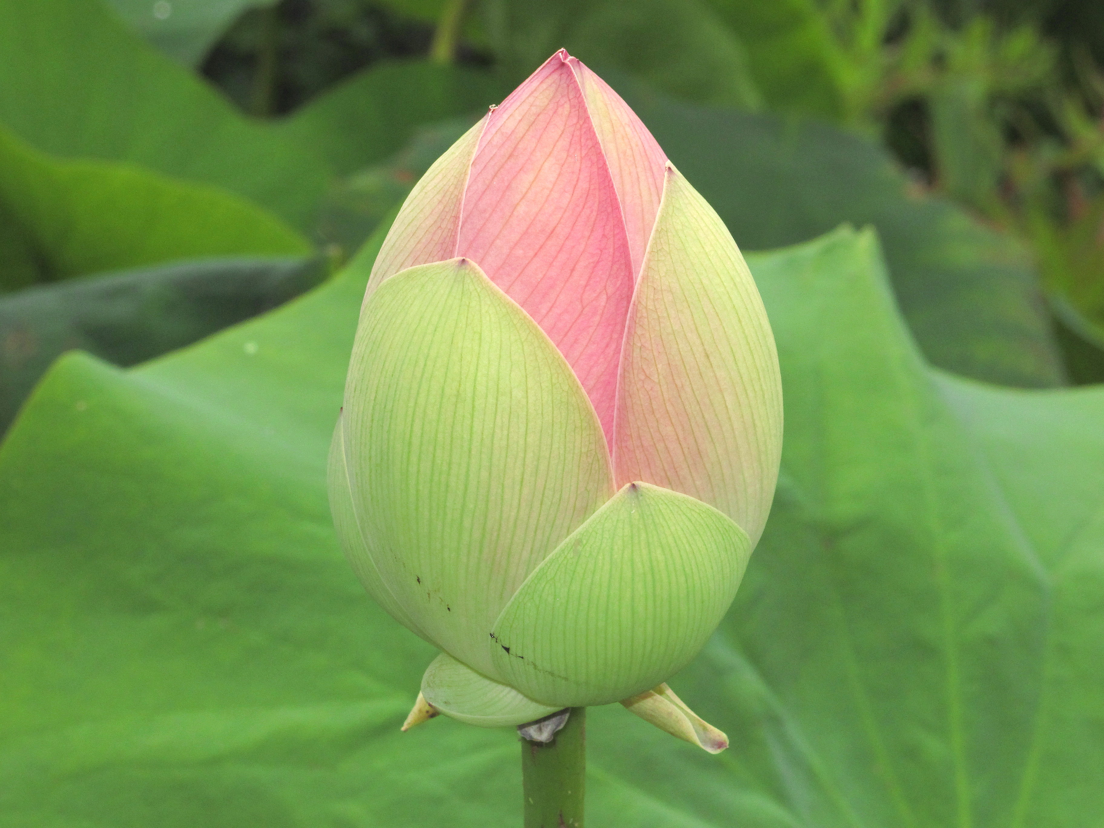 Knospe von Indischer Lotusblüte